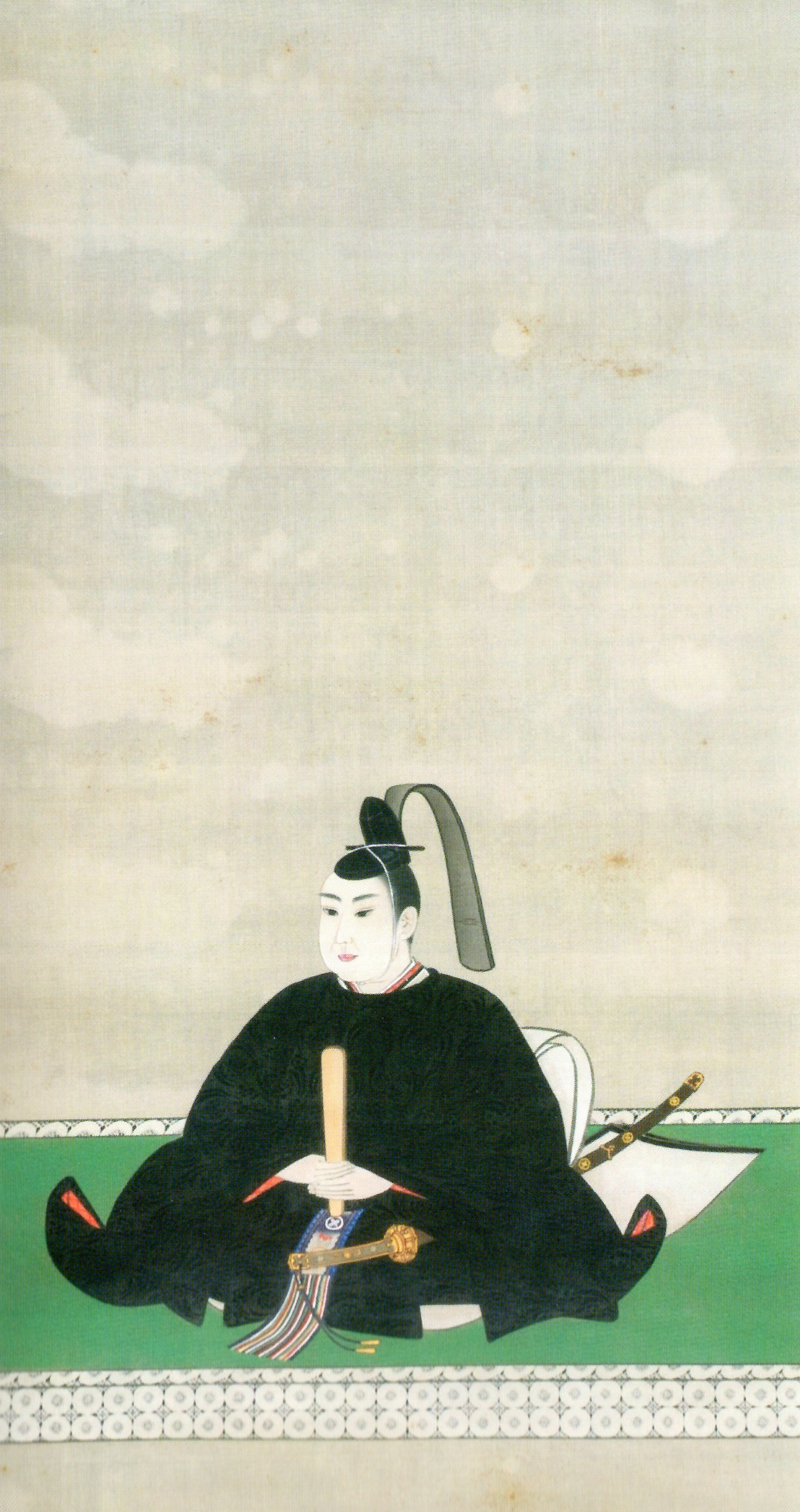 阿部正寧の肖像。